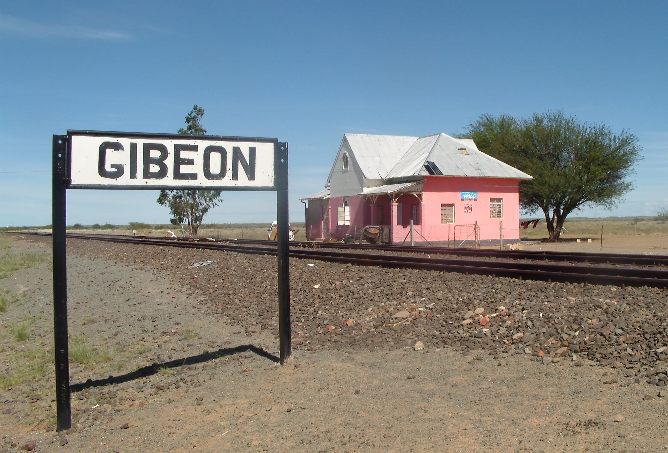 Bahnhof Gibeon, Namibia